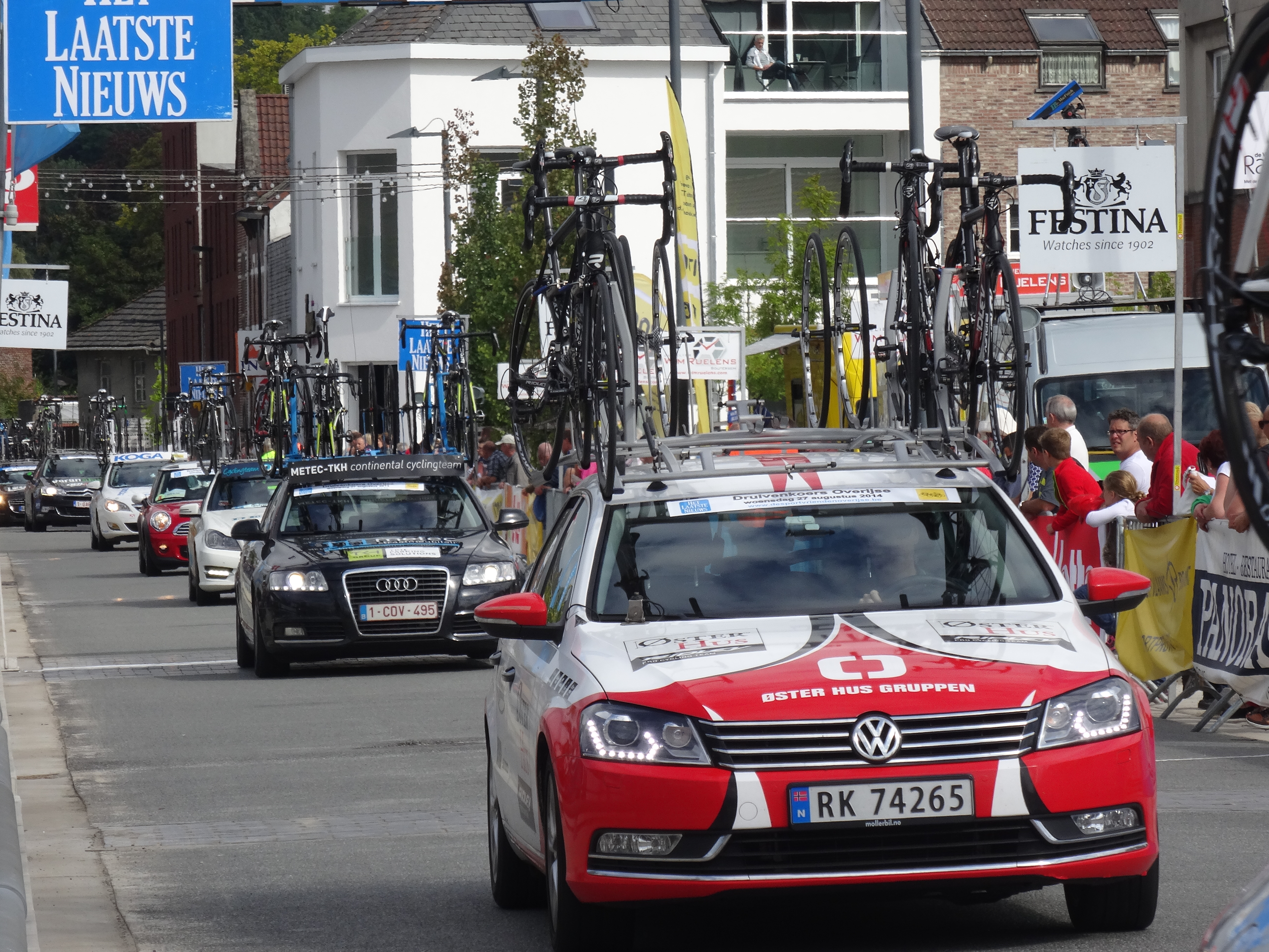 Reportage photographique réalisé le mercredi 27 août à l'occasion de l'arrivée de la Druivenkoers Overijse 2014 à Overijse, Belgique.